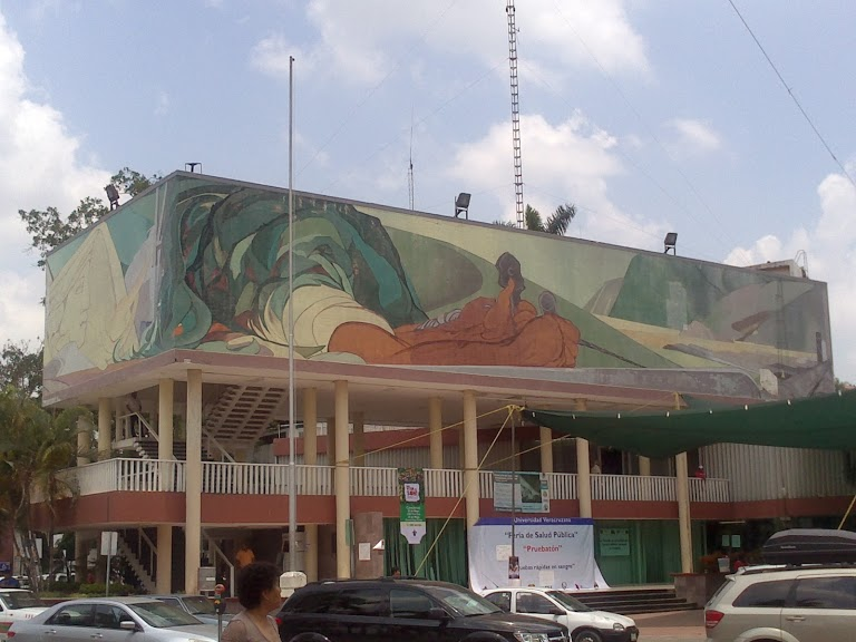 Una foto donde se muestra el Mural de Pablo O´Higgins en la fachada del palacio municipal de la ciudad de Poza Rica de Hidalgo, Veracruz